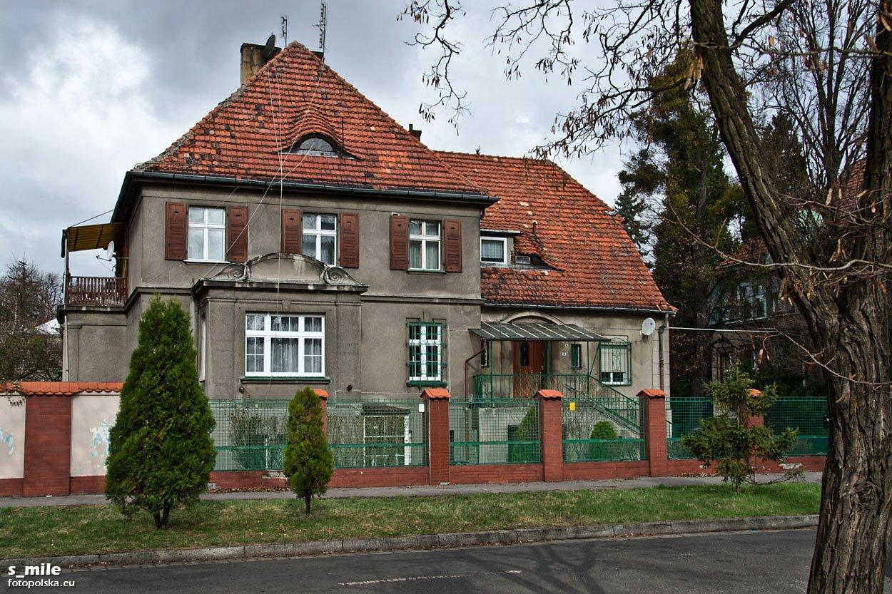 Szymanowskiego 8